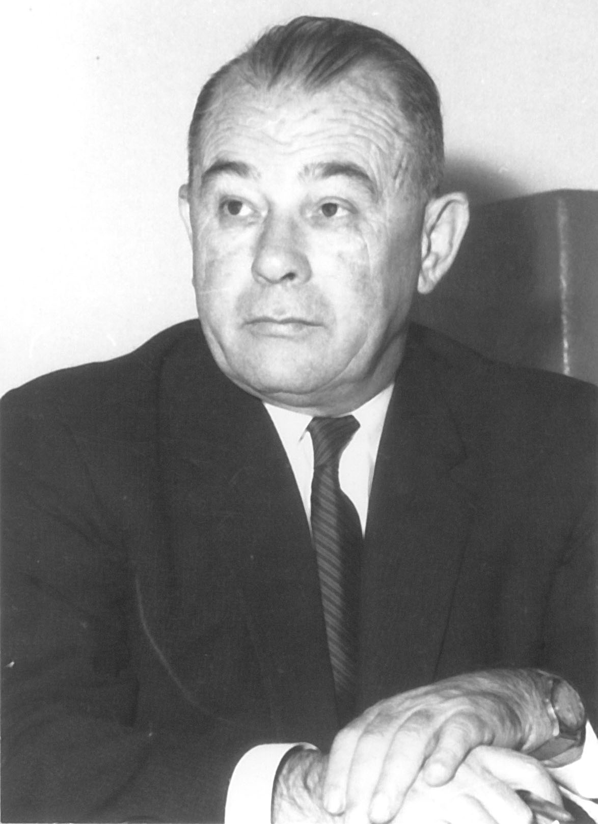 יצחק כהן, המנכ"ל הראשון של בנק אוצר החייל.